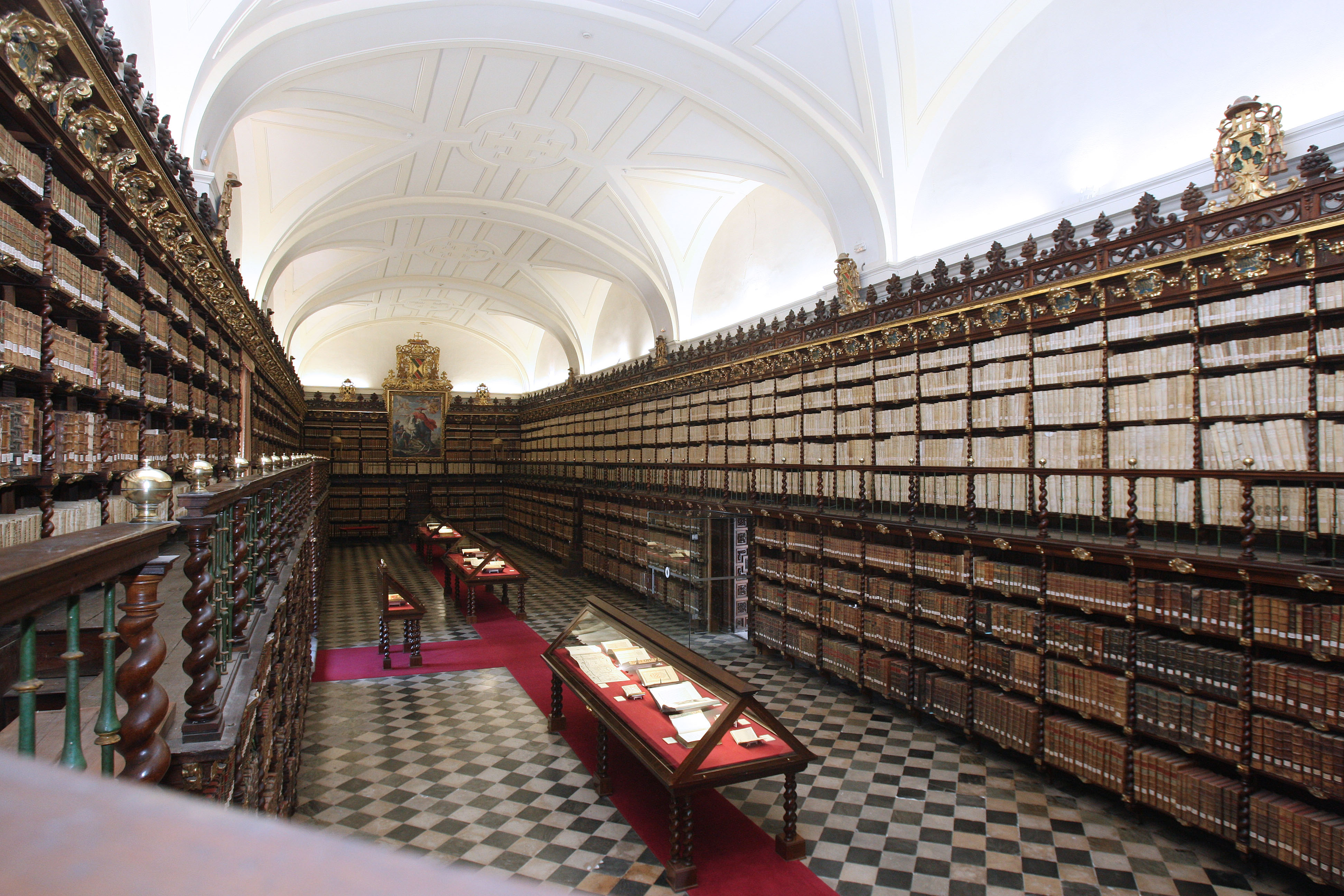 Biblioteca Histórica Santa Cruz (Universidad de Valladolid). Panorama